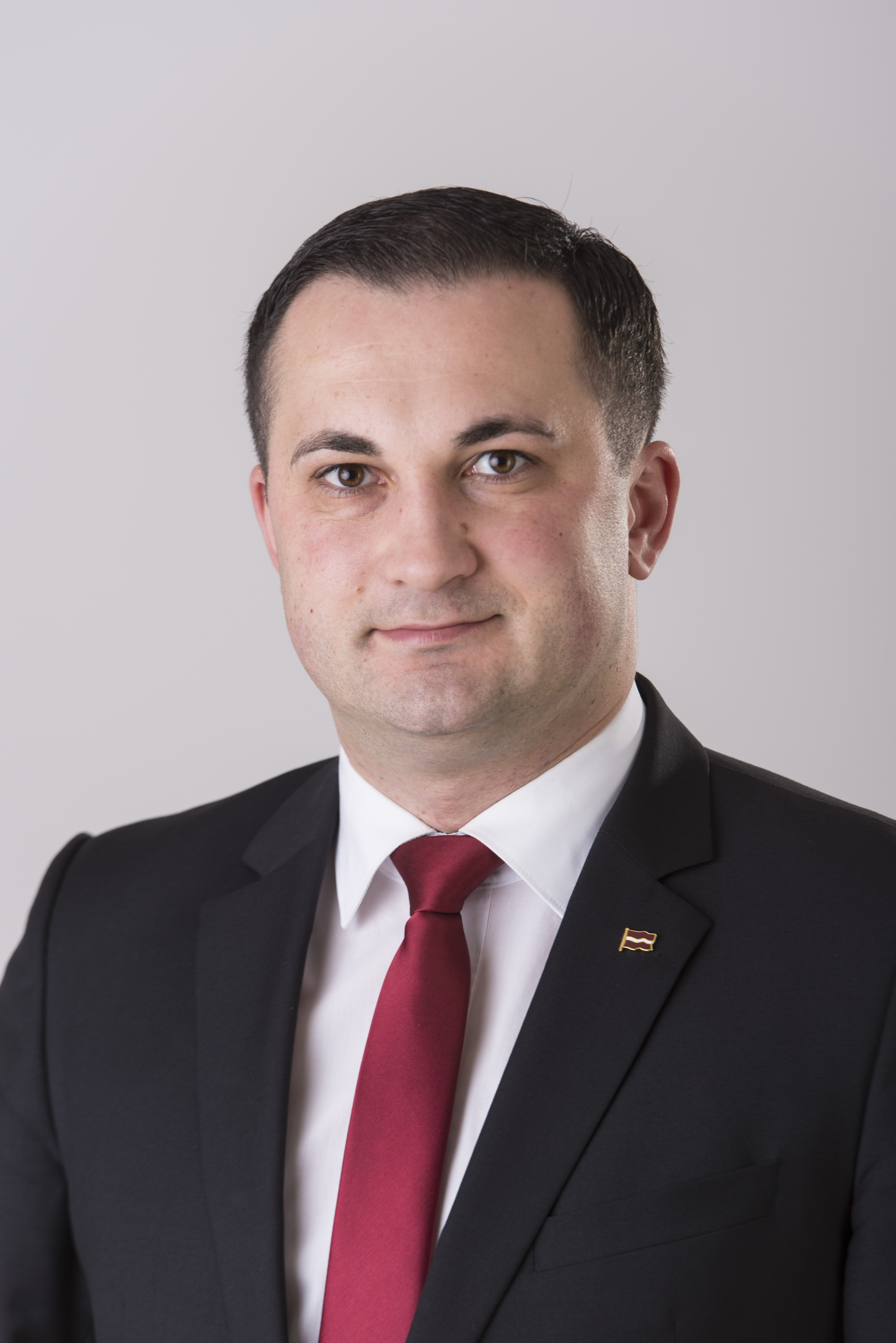 2014.gada 9.decembris. 12.Saeimas deputāts Romāns Naudiņš. Foto: Reinis Inkēns, Saeimas Kanceleja Izmantošanas noteikumi: saeima.lv/lv/autortiesibas